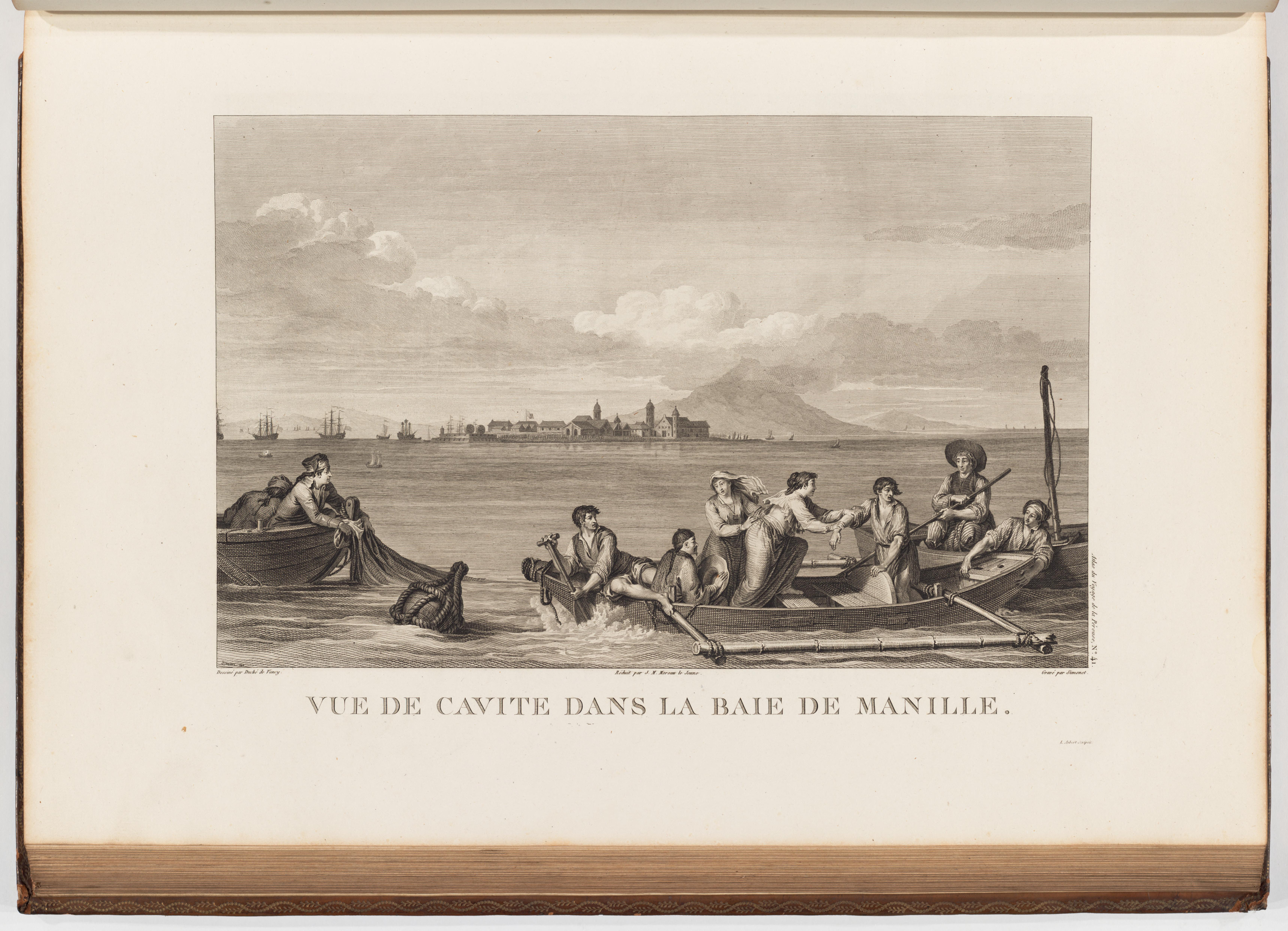 Voyage de La Pérouse autour du monde /publié conformément au décret du 22 avril 1791, et rédigé par L.A. Milet-Mureau.